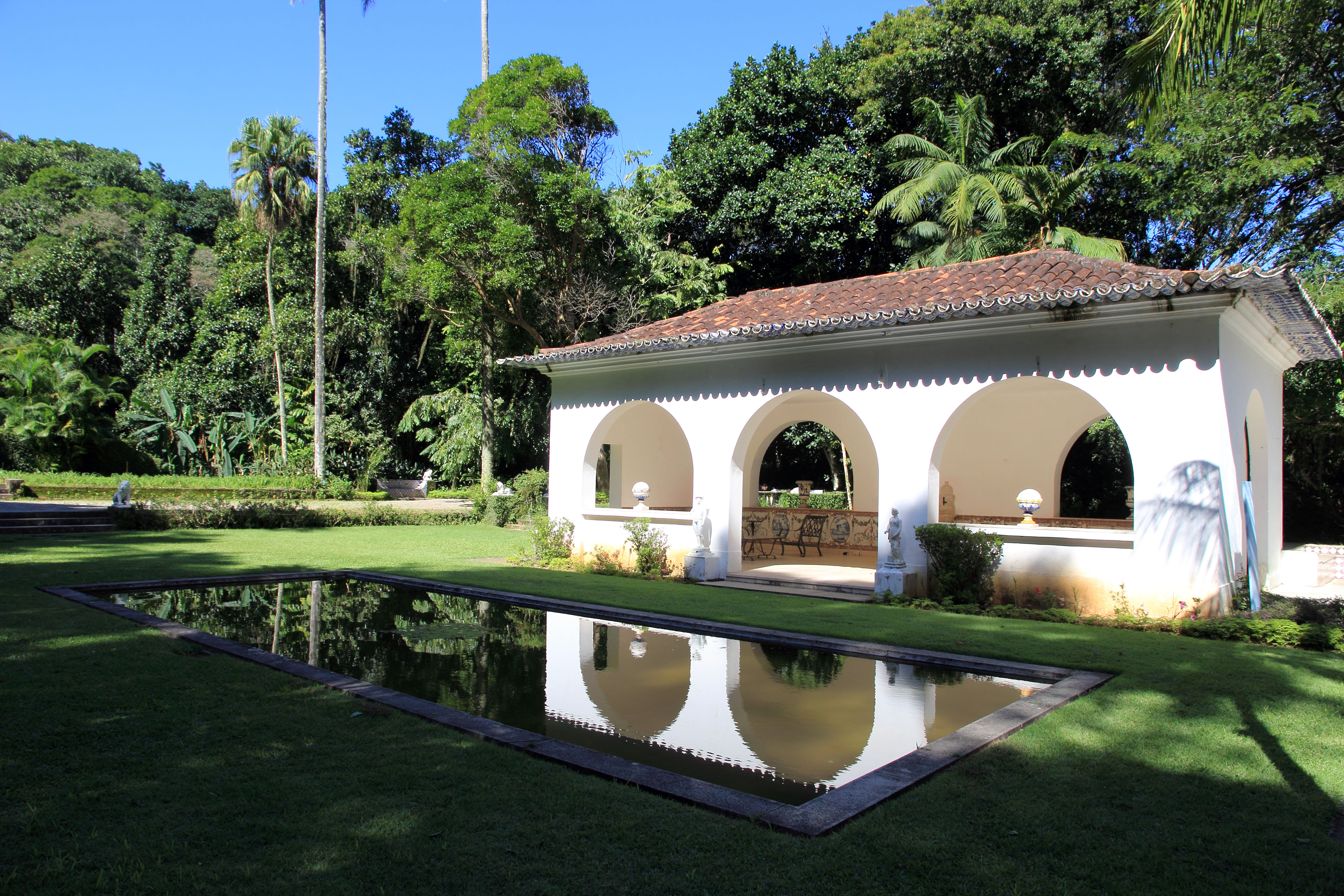 Museus Castro Maya – Museu do Açude, no Alto da Boa Vista.